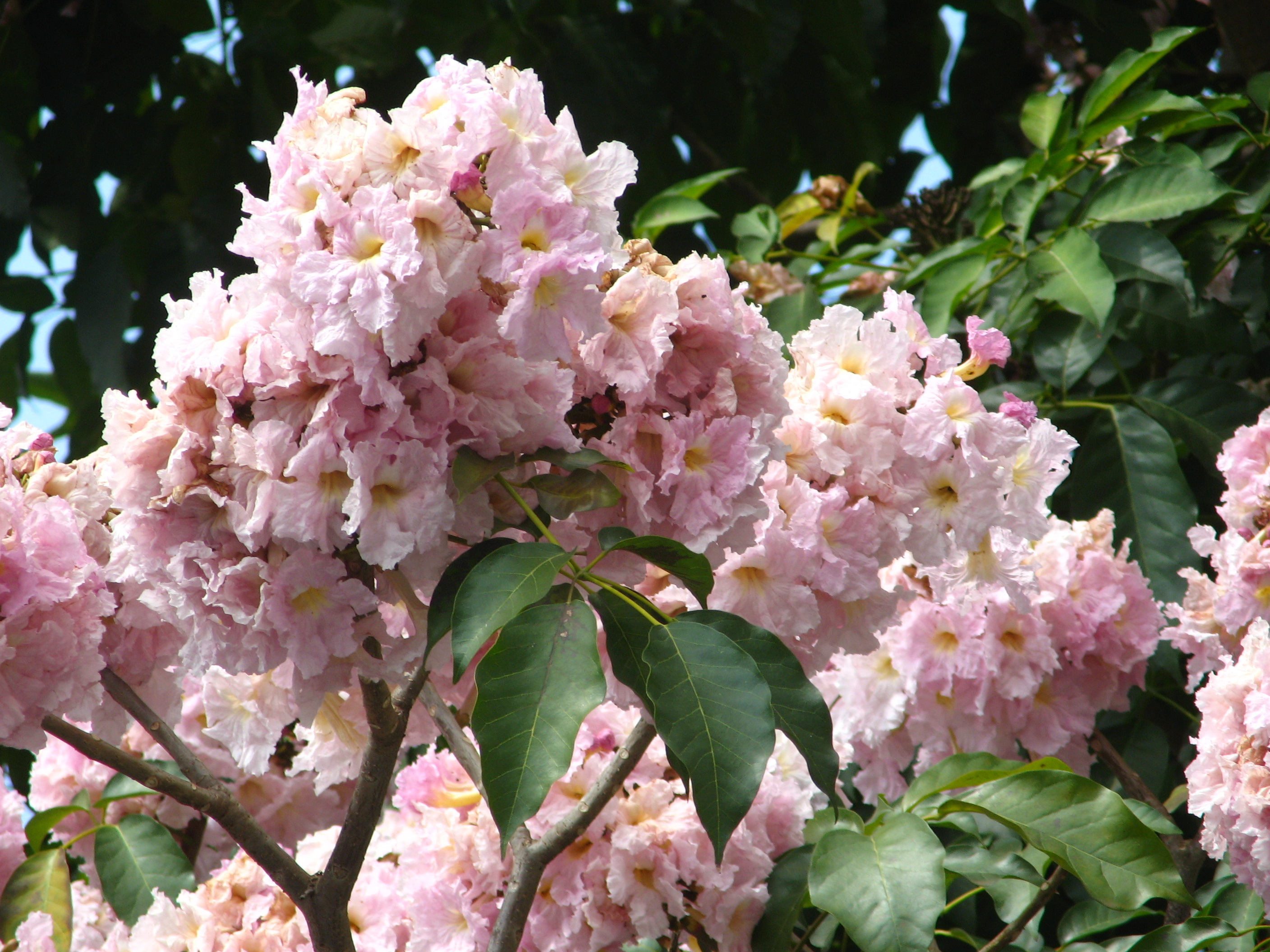 Tabebuia heptaphylla